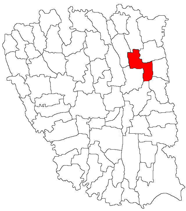 Categorie:Hărţi ale judeţului Galaţi